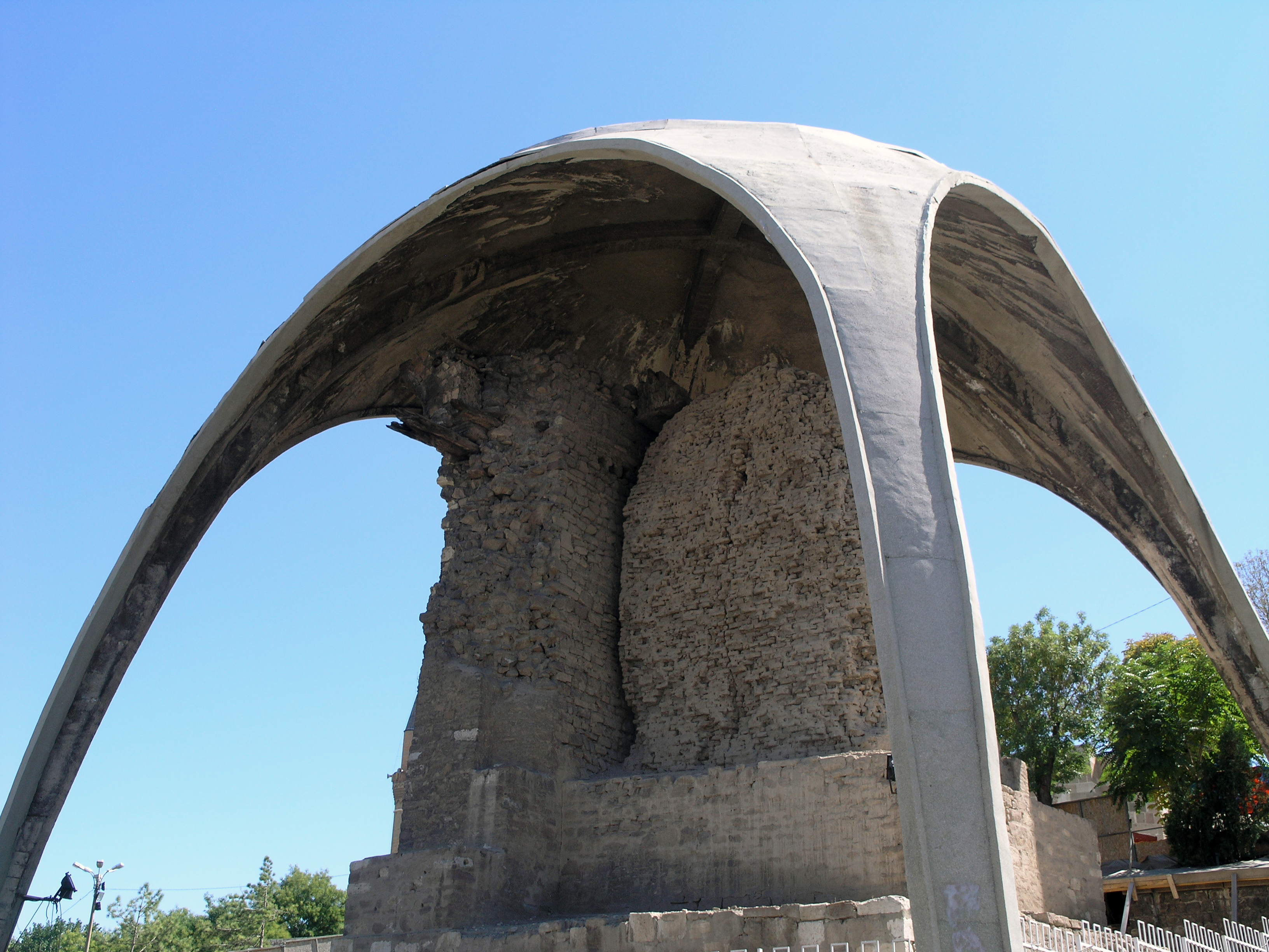 Турция, Конья – Холм Ала ад-Дина (Руины дворца султана Кылыч-Арслана II)